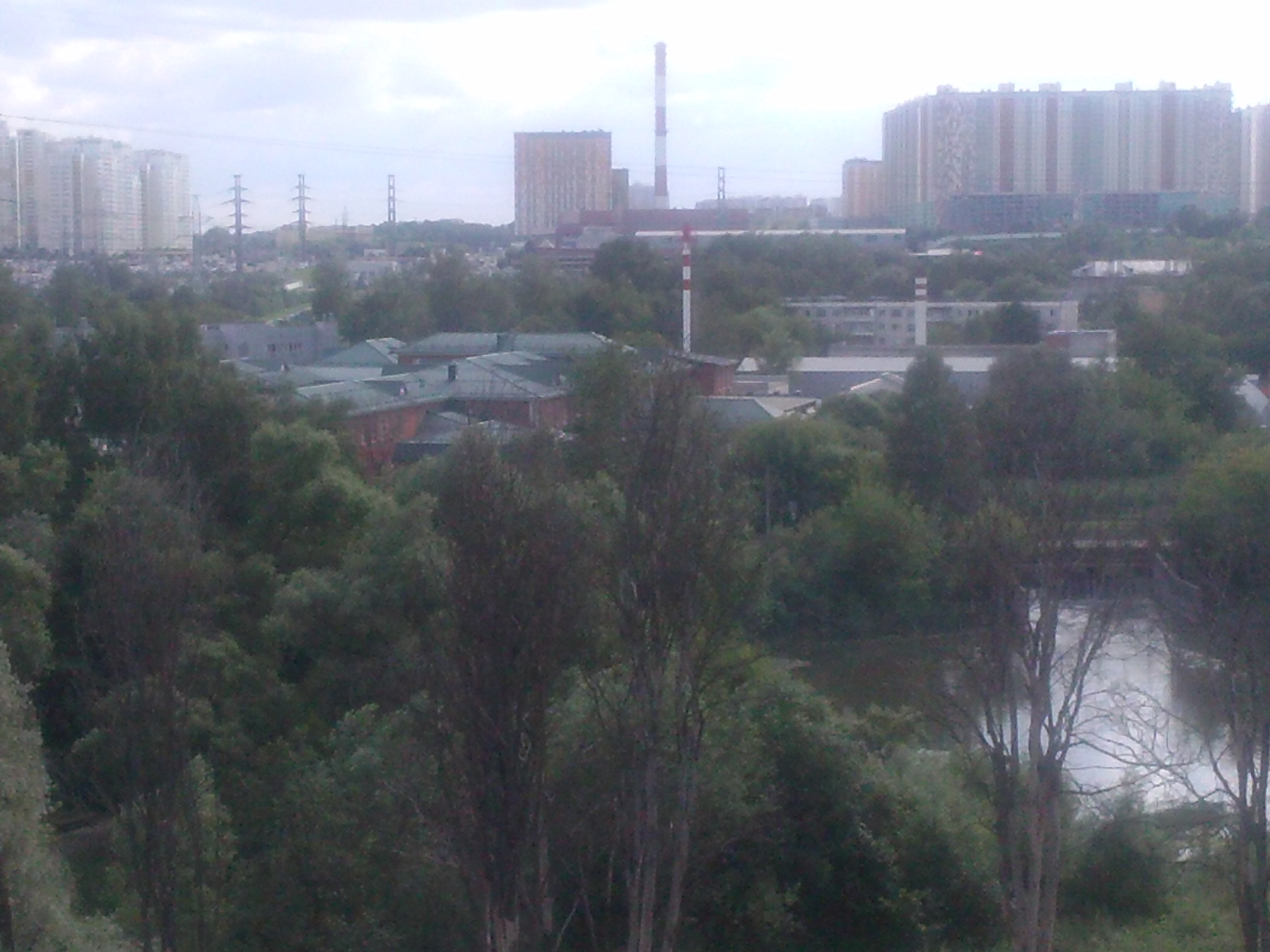 Вид на посёлок Новобратцевский со стороны Путилково